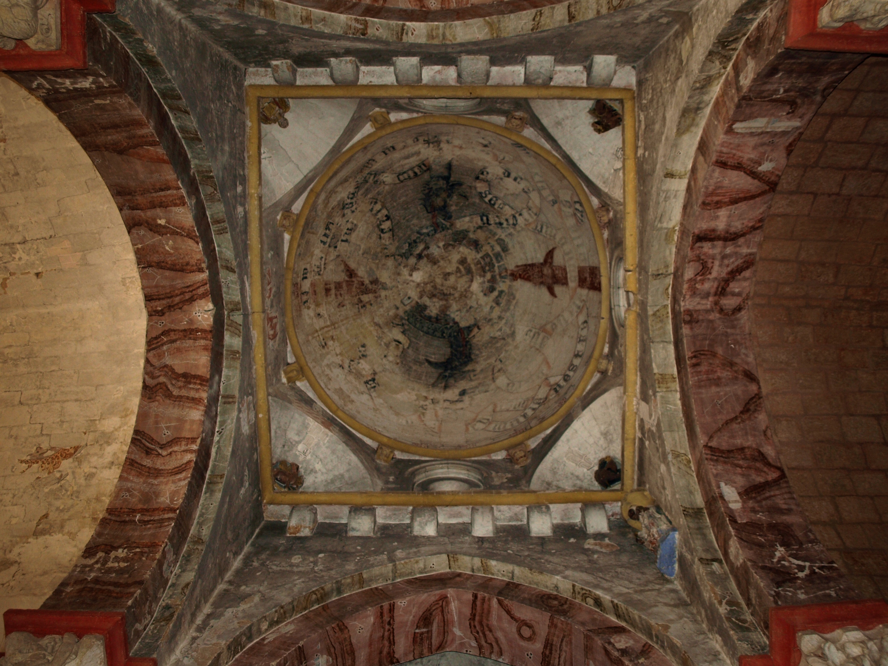 Zorita del Páramo (Palencia).Iglesia de San Lorenzo. Cúpula